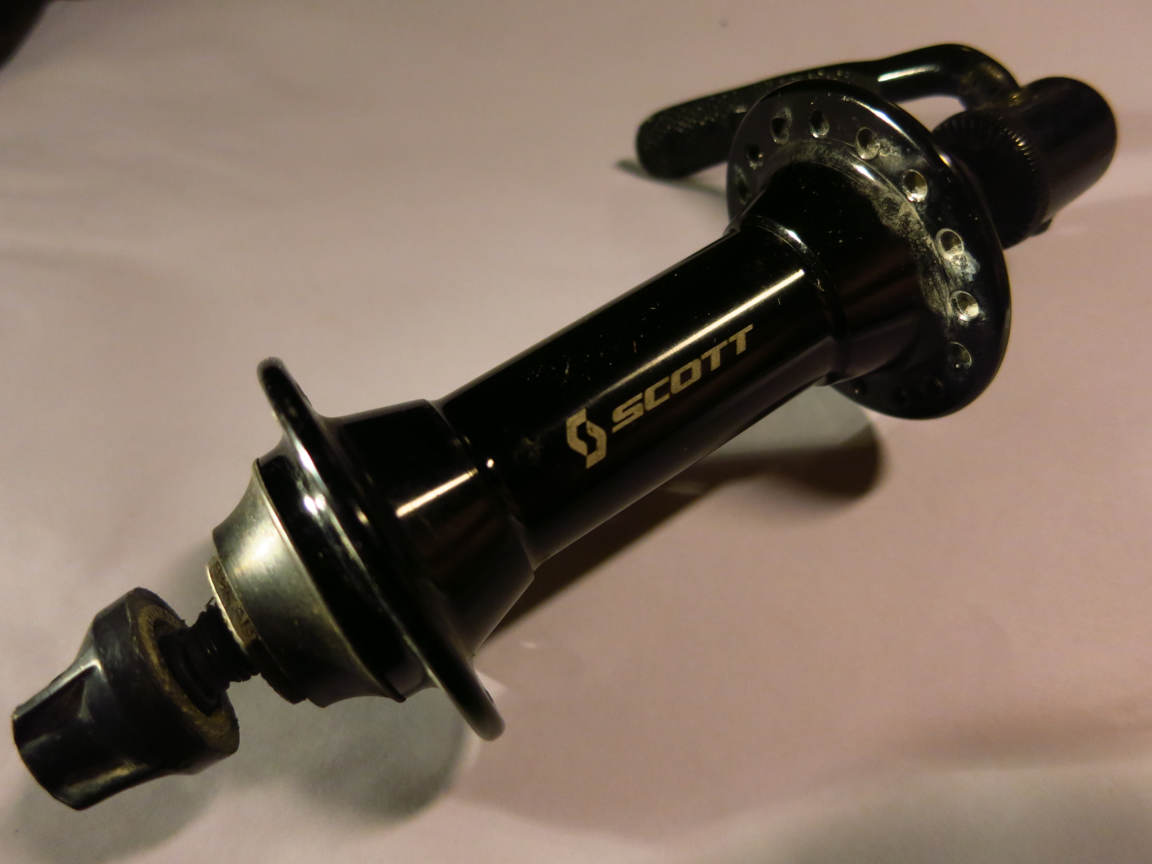 firma scott esirumm